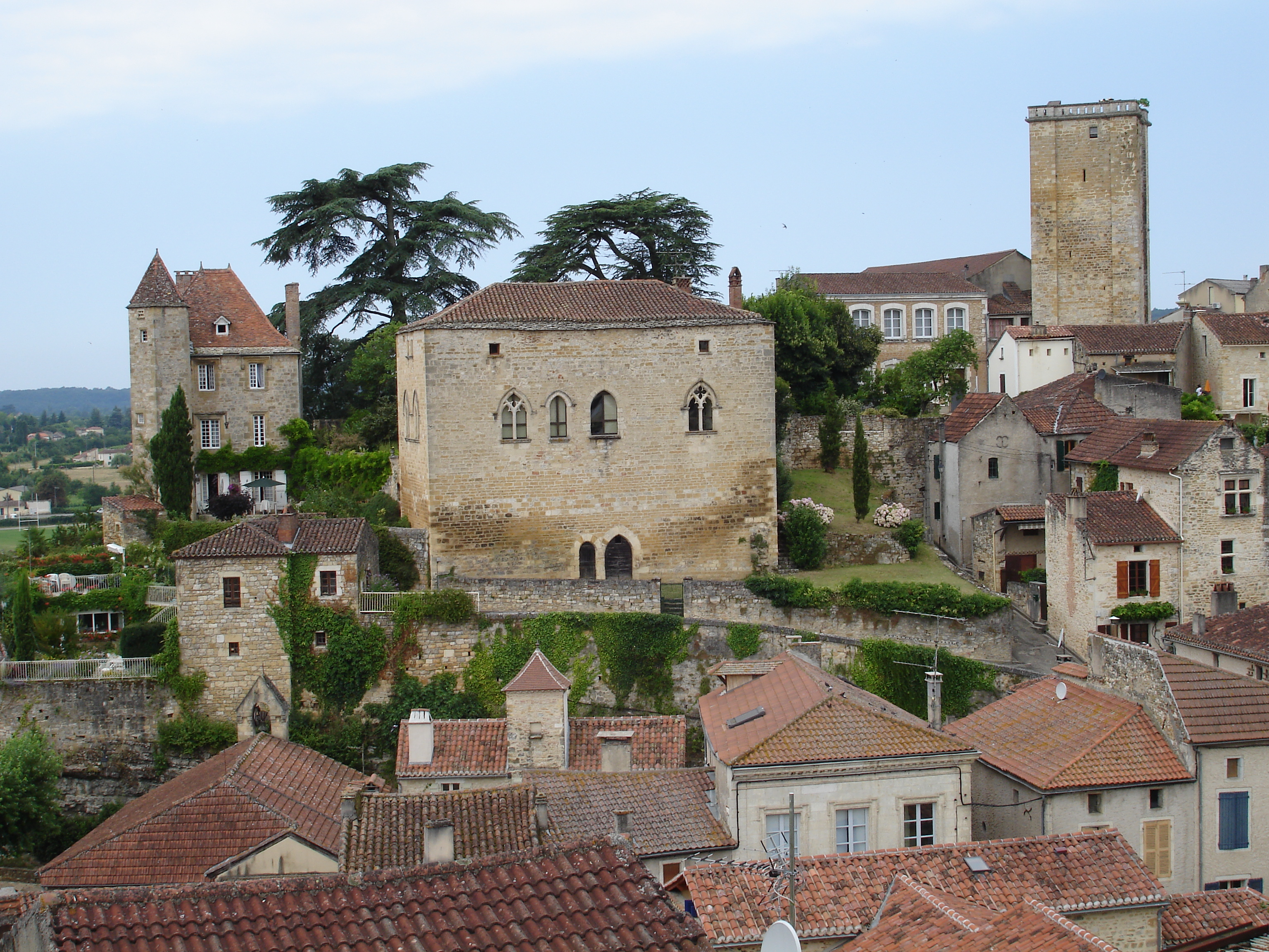 vue de Puy-l'évêque